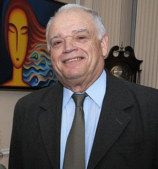 Pérez Manrique, Ministro de la Suprema Corte de Justicia.